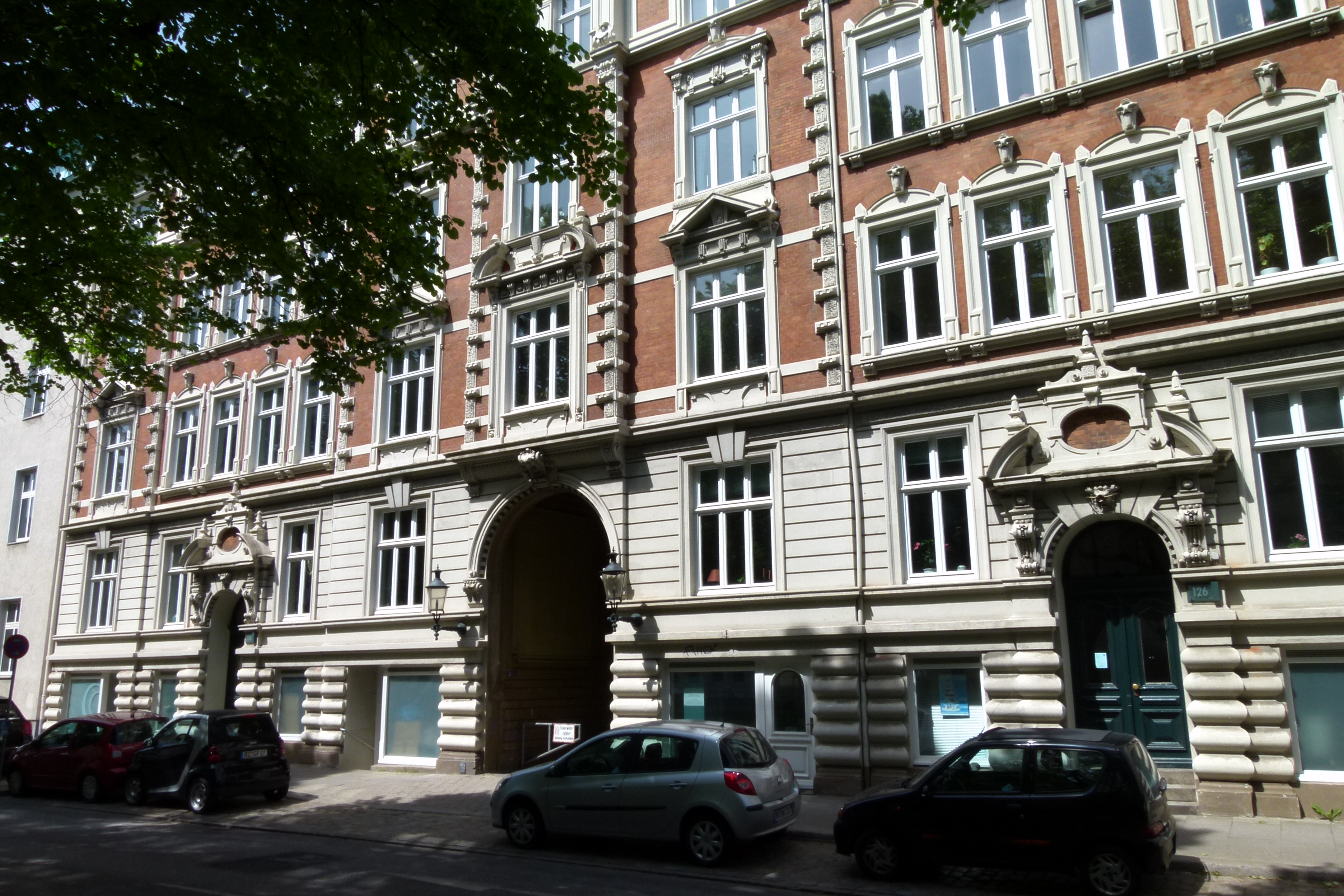 Hamburg, Altona-Altstadt, Palmaille 126/b, 126a Hofbebauung This is a photograph of an architectural monument. , 16469, Ensemble: Wohnhaus Palmaille 126/ 126b, 126a, 130/ 130b, 130a, Vorderhaus, Hofraum mit Grünfläche und Rondell, dem Hinterhaus und dessen rückwärtigen Freiflächen